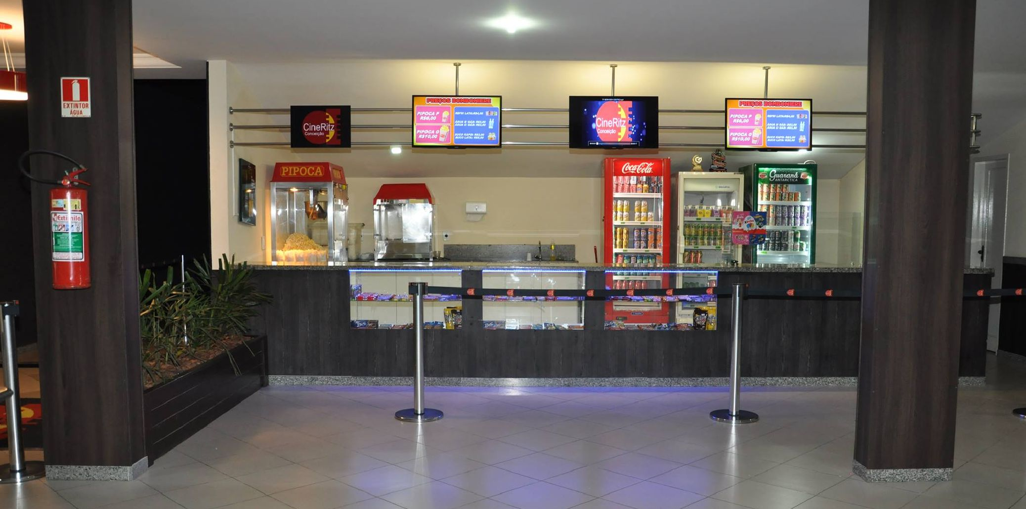 Bomboniere do Cine Ritz Conceição de Linhares, ES